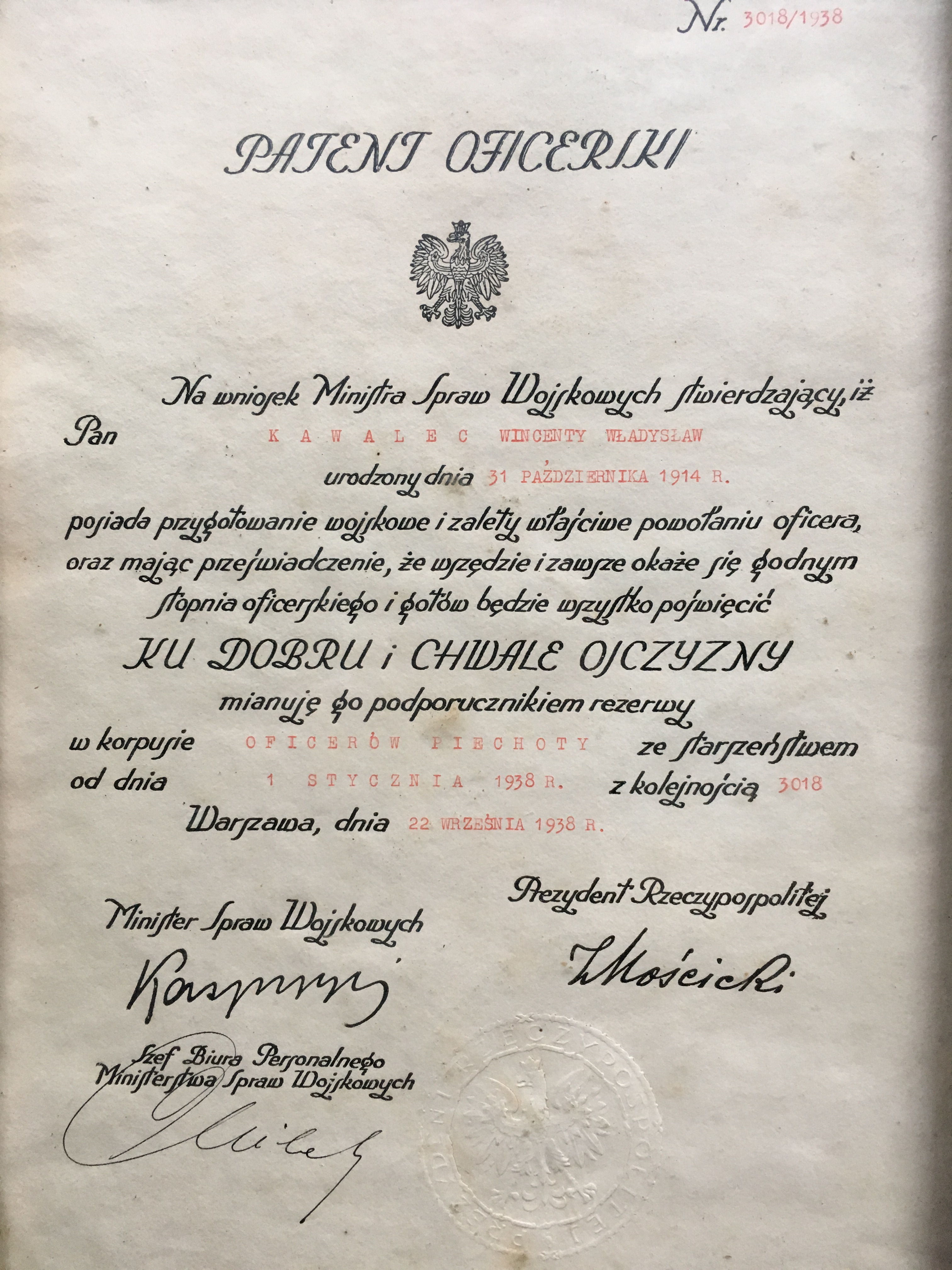 Patent oficerski z 22 września 1938.